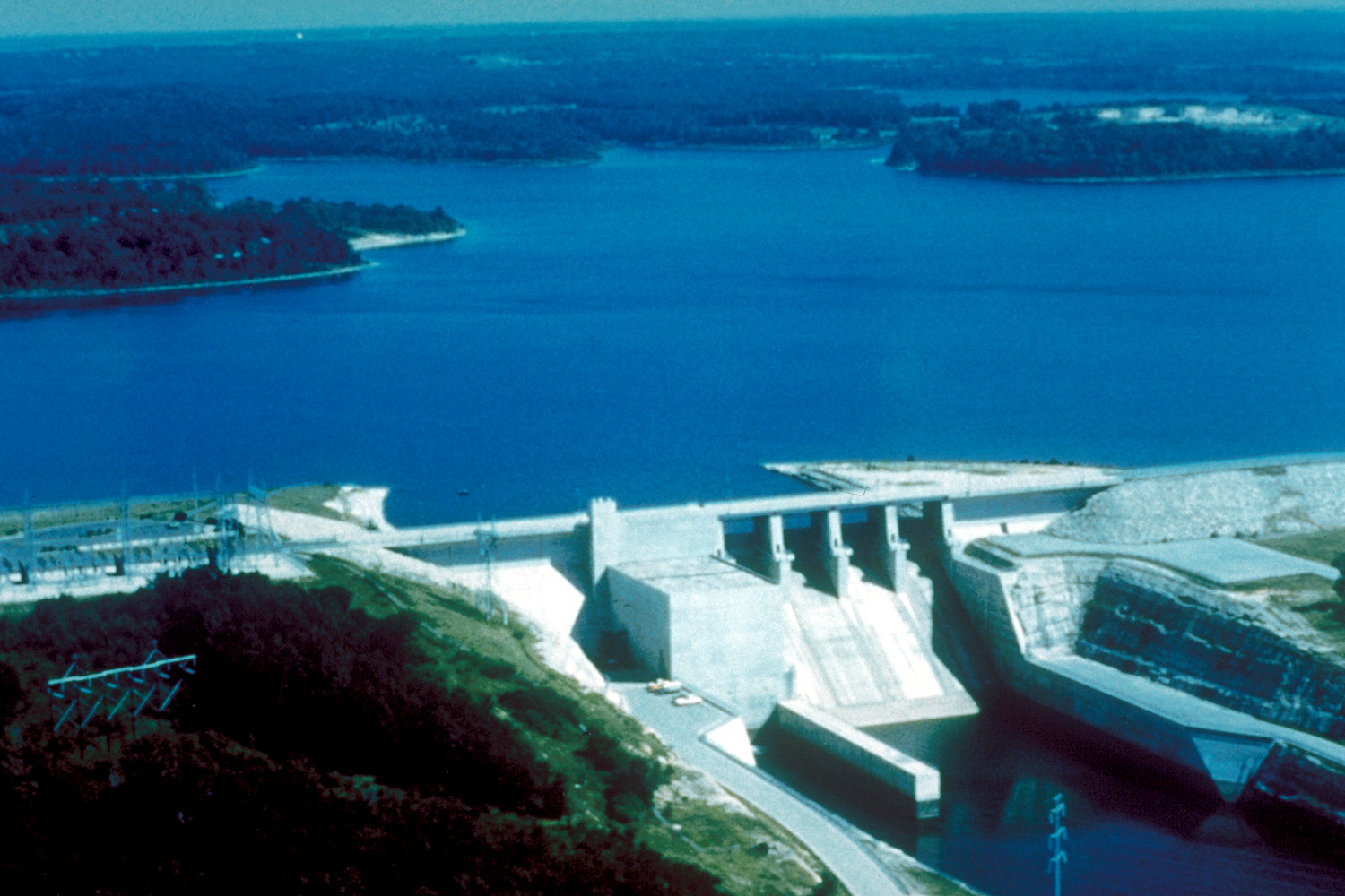 Stockton Lake and Dam, near Stockton, Missouri, USA